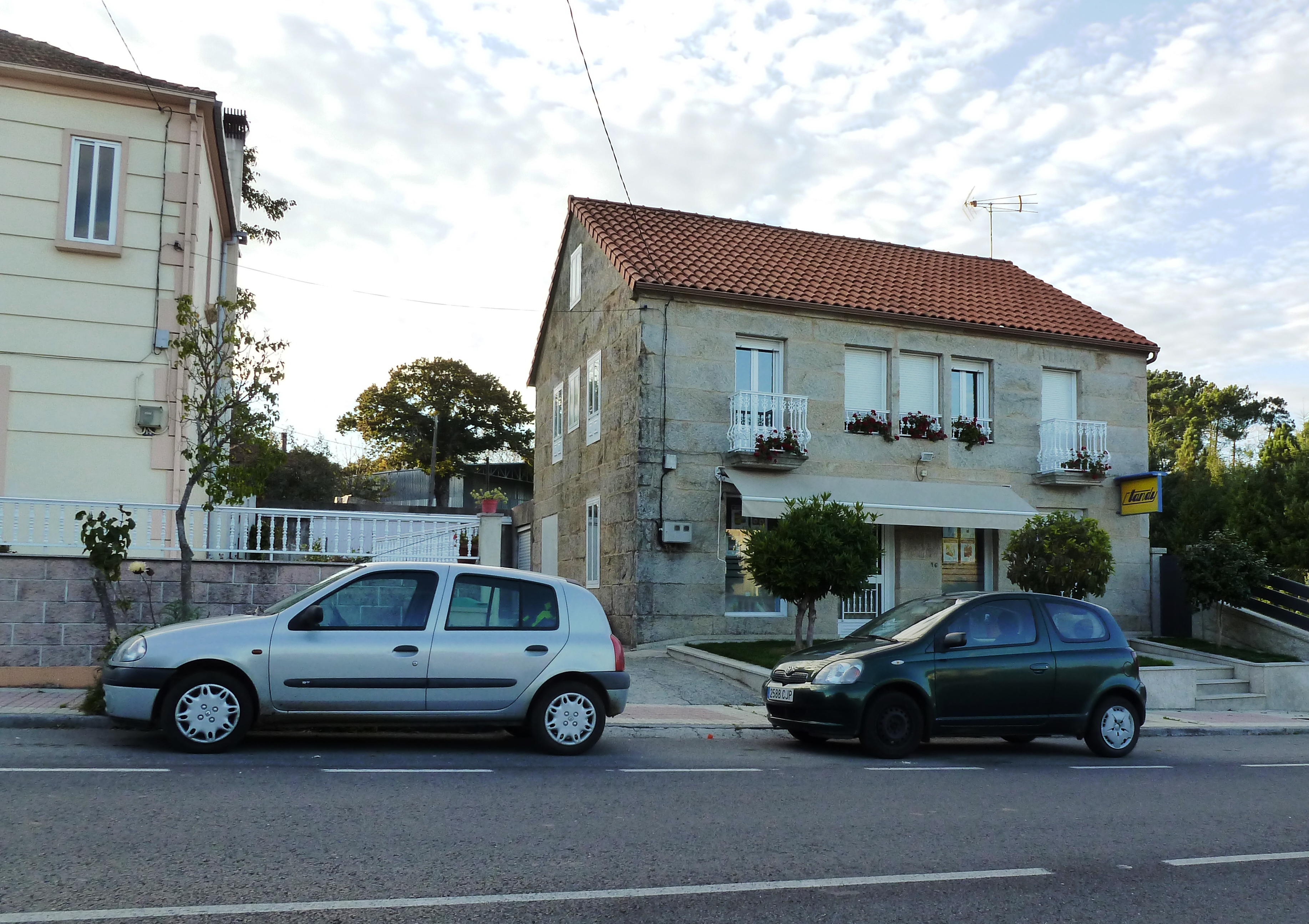 A Tolda, Aguada, Carballedo